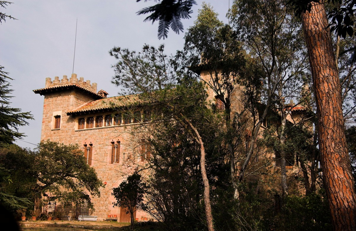 Mas Quadras (Massanes-La Selva-Catalunya), Castell del Baró de Quadras obra de Josep Puig i Cadafalch 1900.